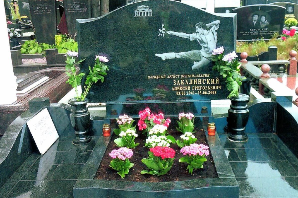 Надгробный камень на могиле Алексея Закалинского